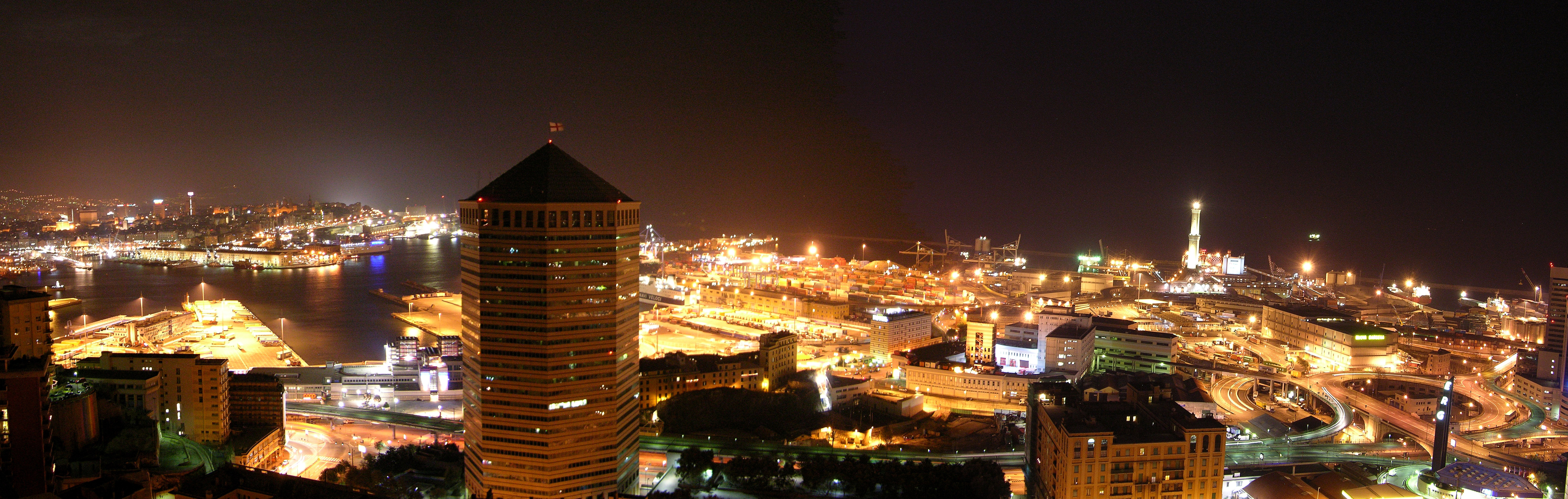 Genova - Panorama del porto di notte da dietro il Matitone